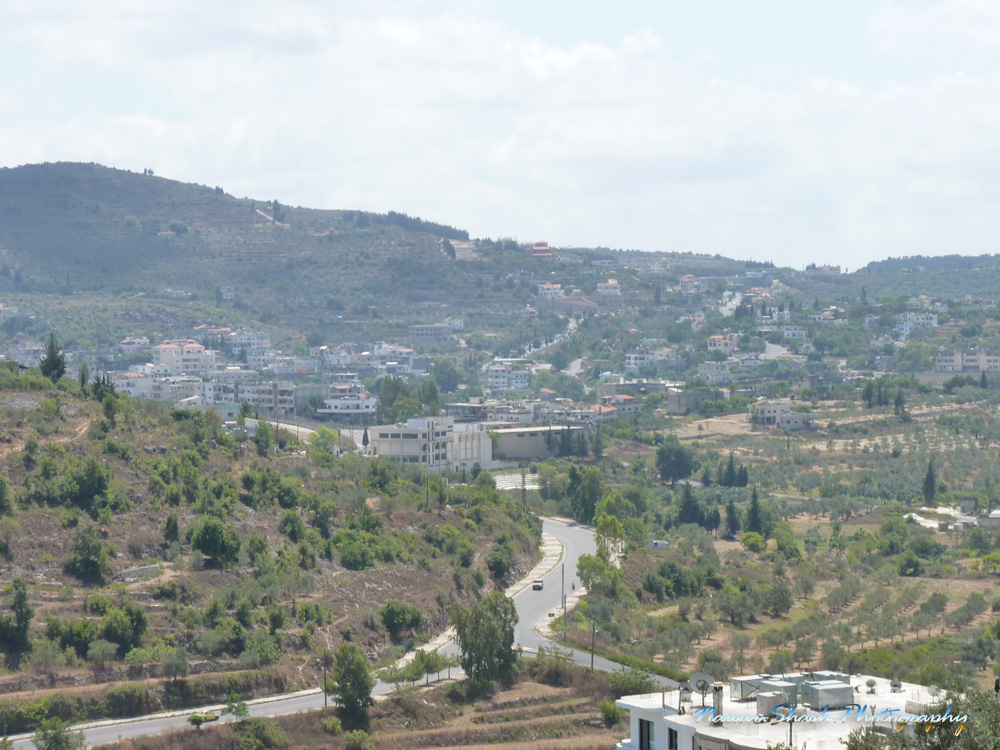 Ash-Shaykh Badr, Syria